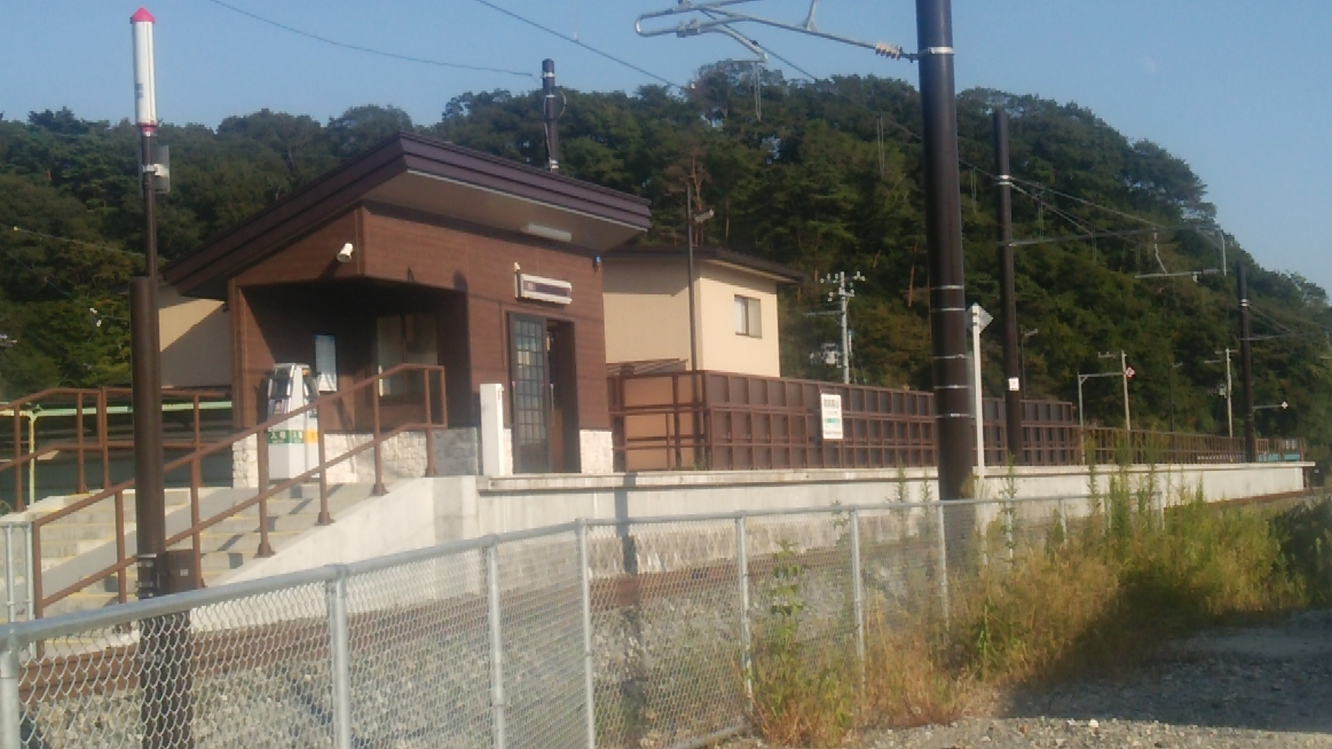 陸前富山駅全景